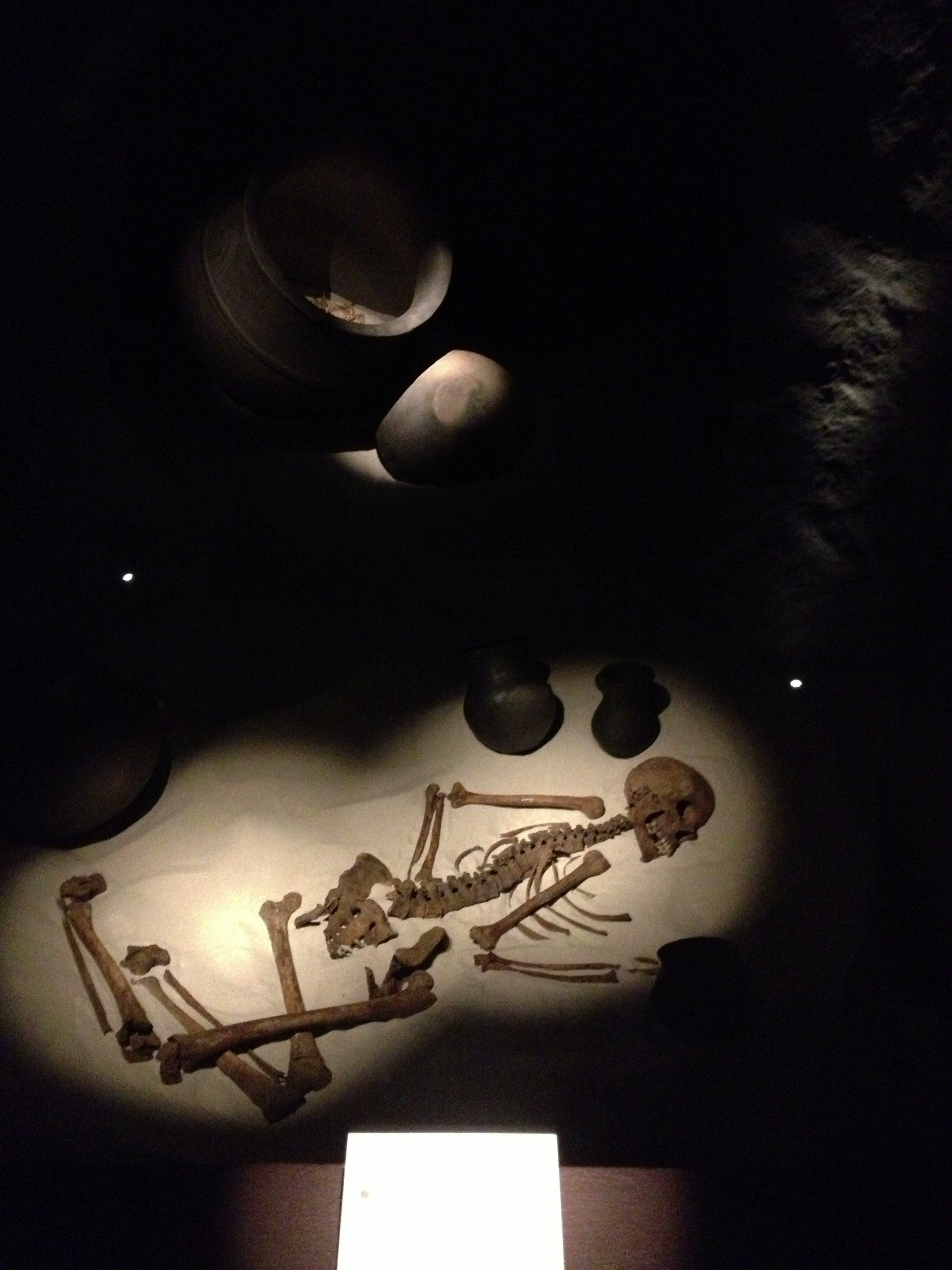 Kostrový hrob ženy uložené fe skrčené poloze vybavený nádobami